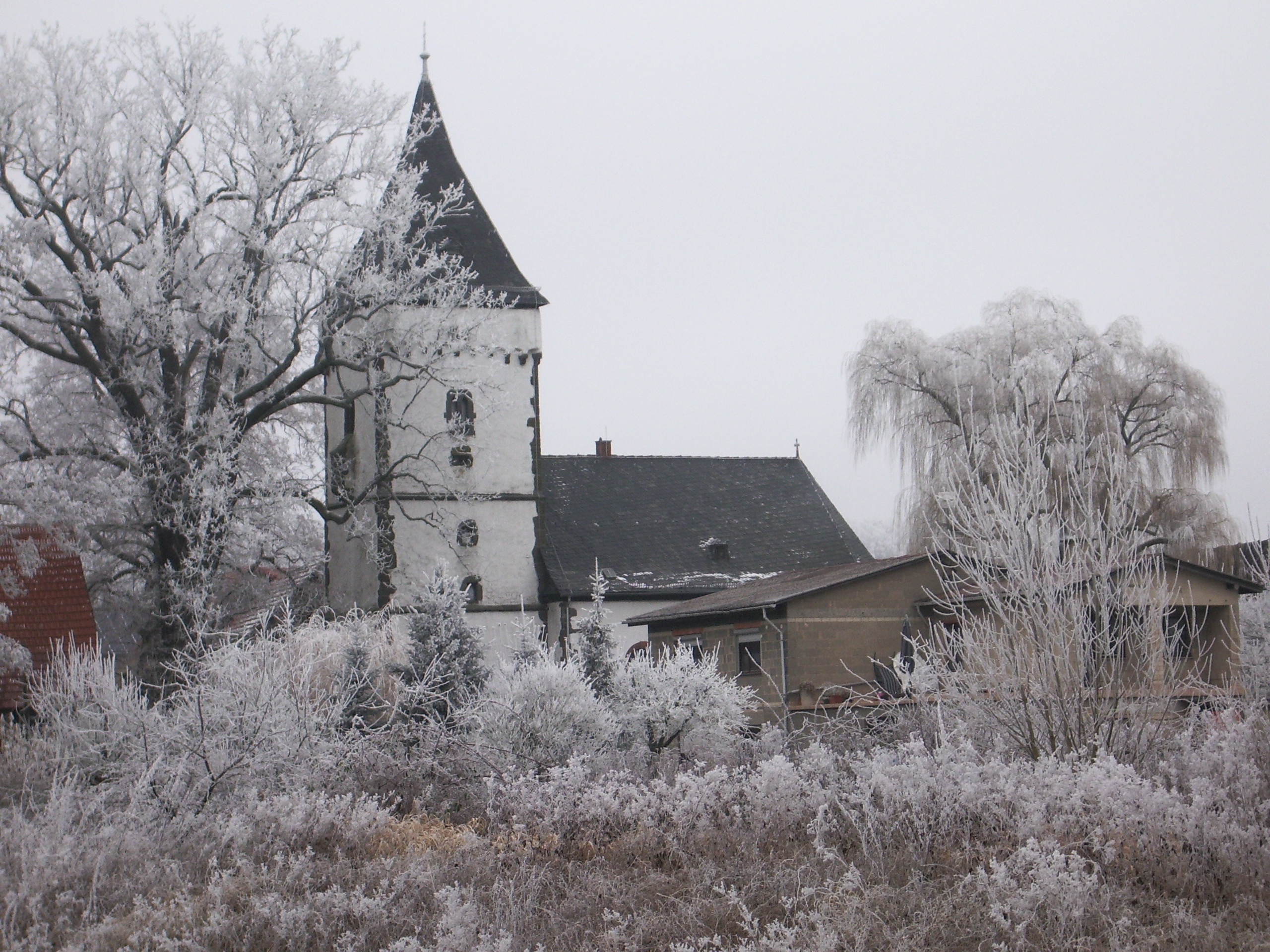 Kirche zu Nieder-Bessingen, Lich, Deutschland